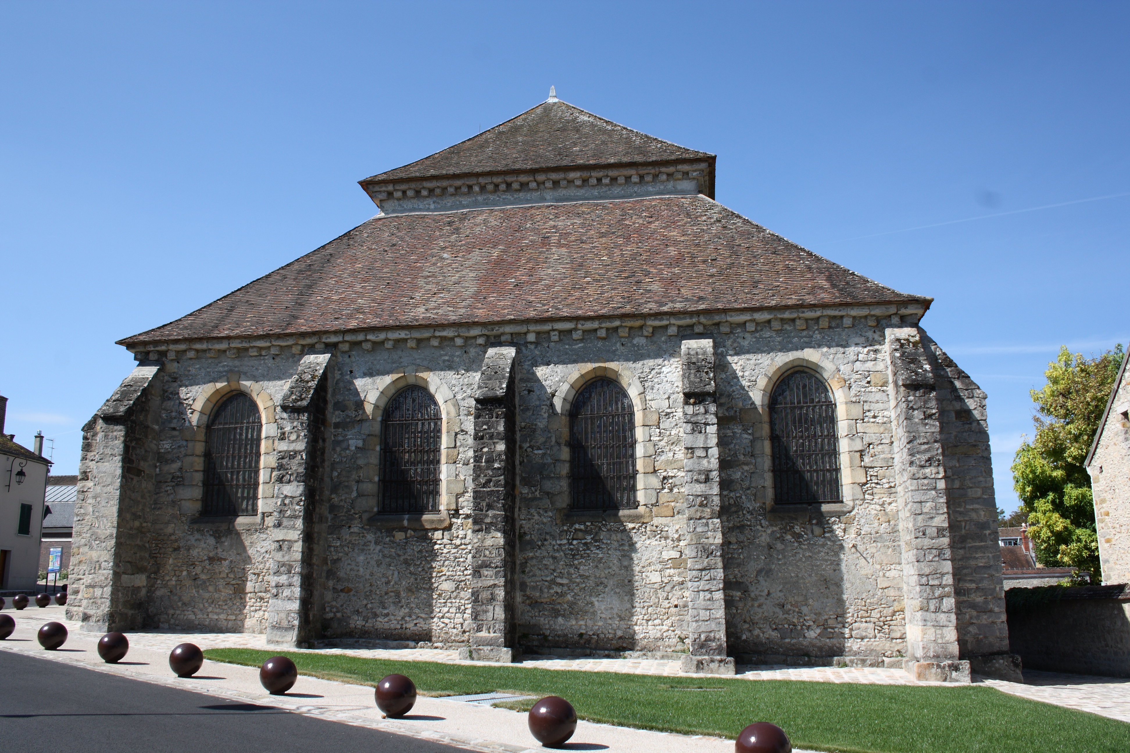 Katholische Pfarrkirche Saint-Pierre in Avon im Département Seine-et-Marne in der Region Île-de-France (Frankreich), Chor um 1555 Object location48° 24′ 18.72″ N, 2° 43′ 15.96″ E